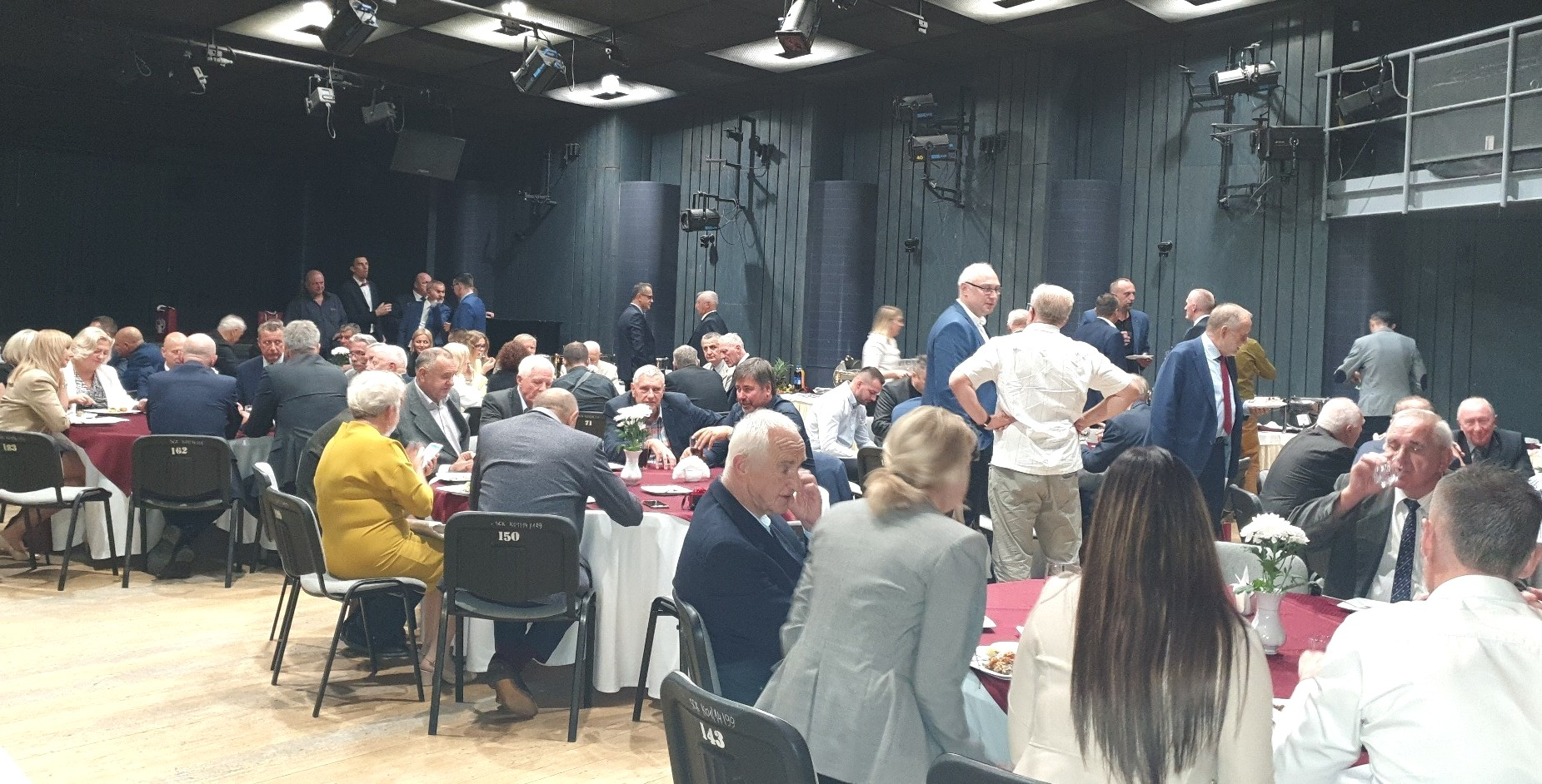 70-lecie PGE Spójnia Stargard Jubileusz, Gala